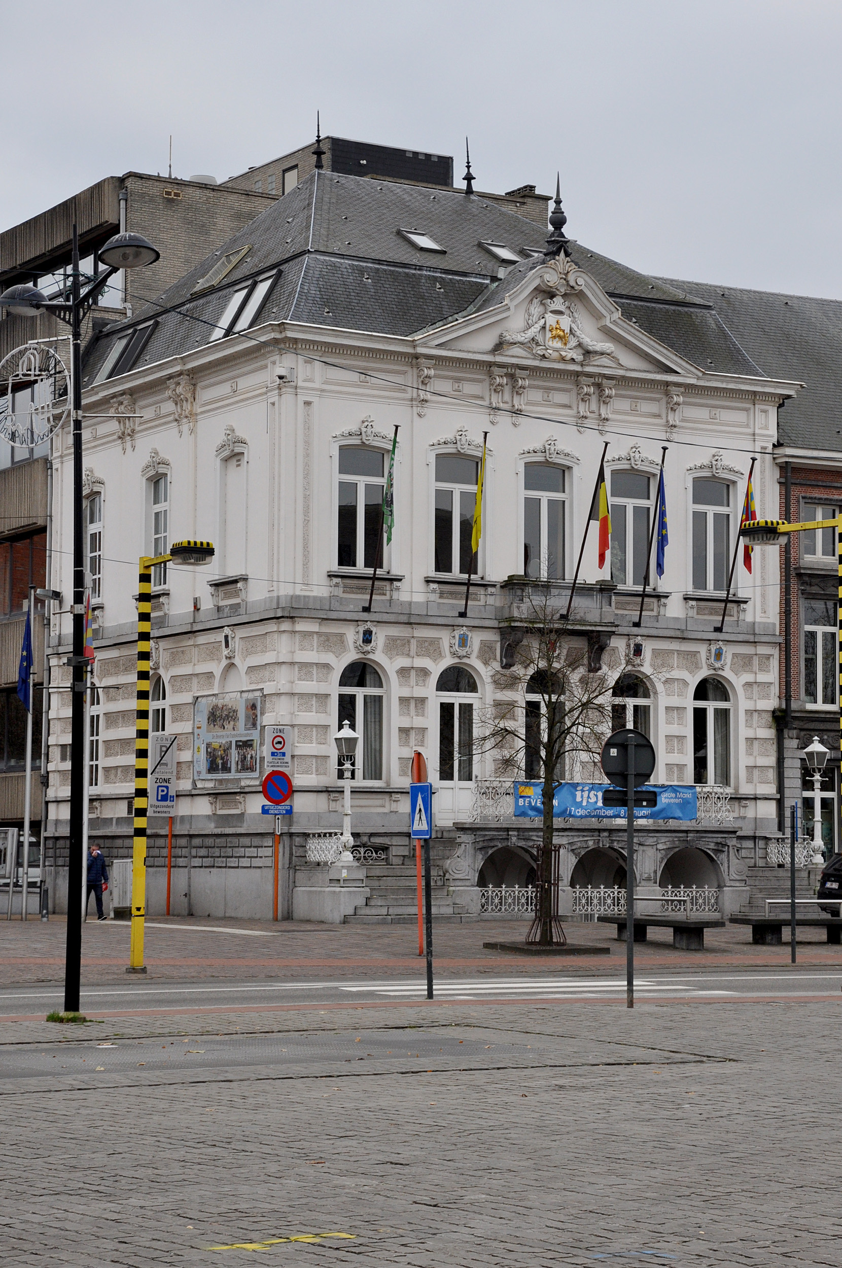 Beveren, oud gemeentehuis